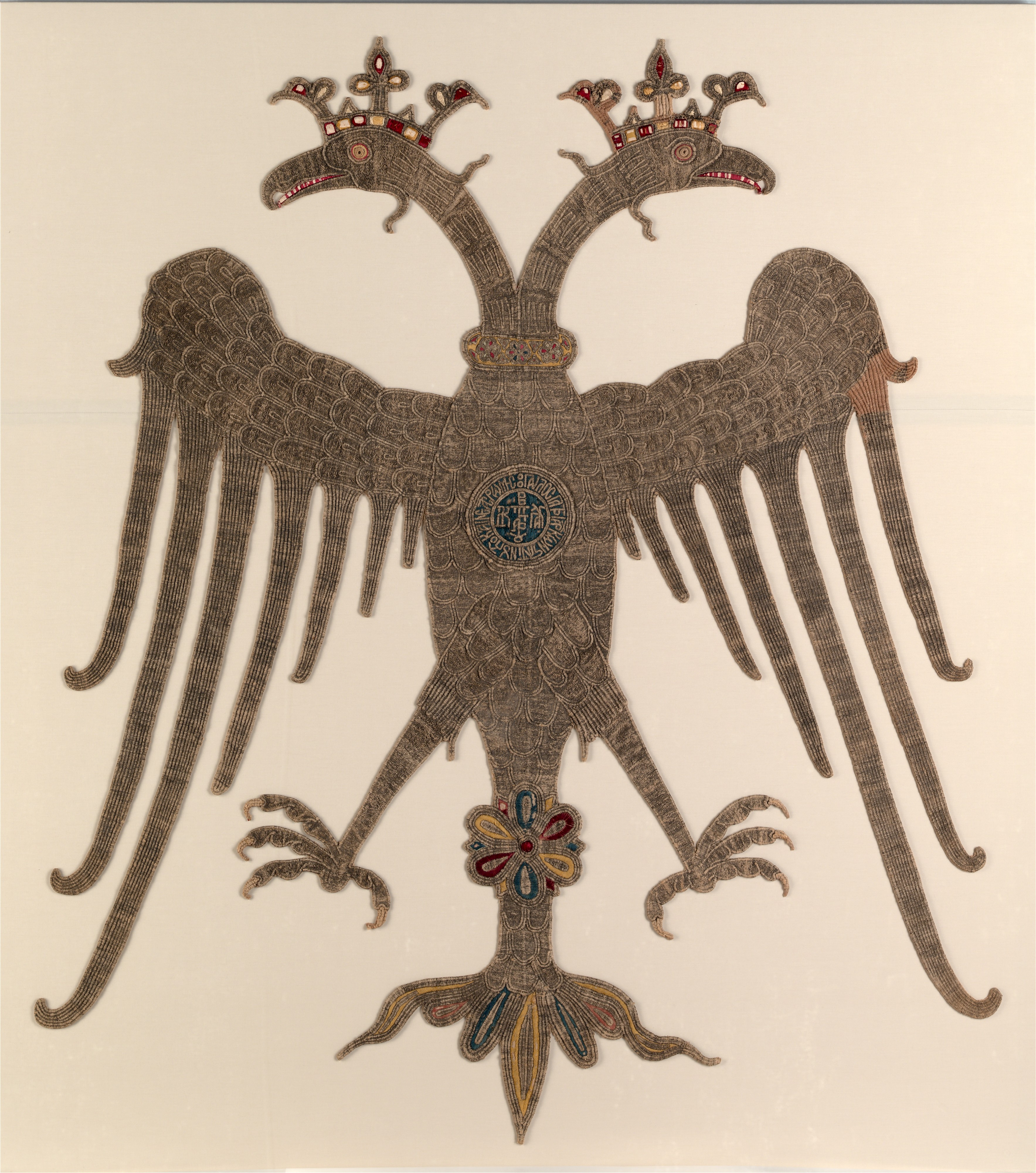 Byzantine; Banner; Textiles-Embroidered